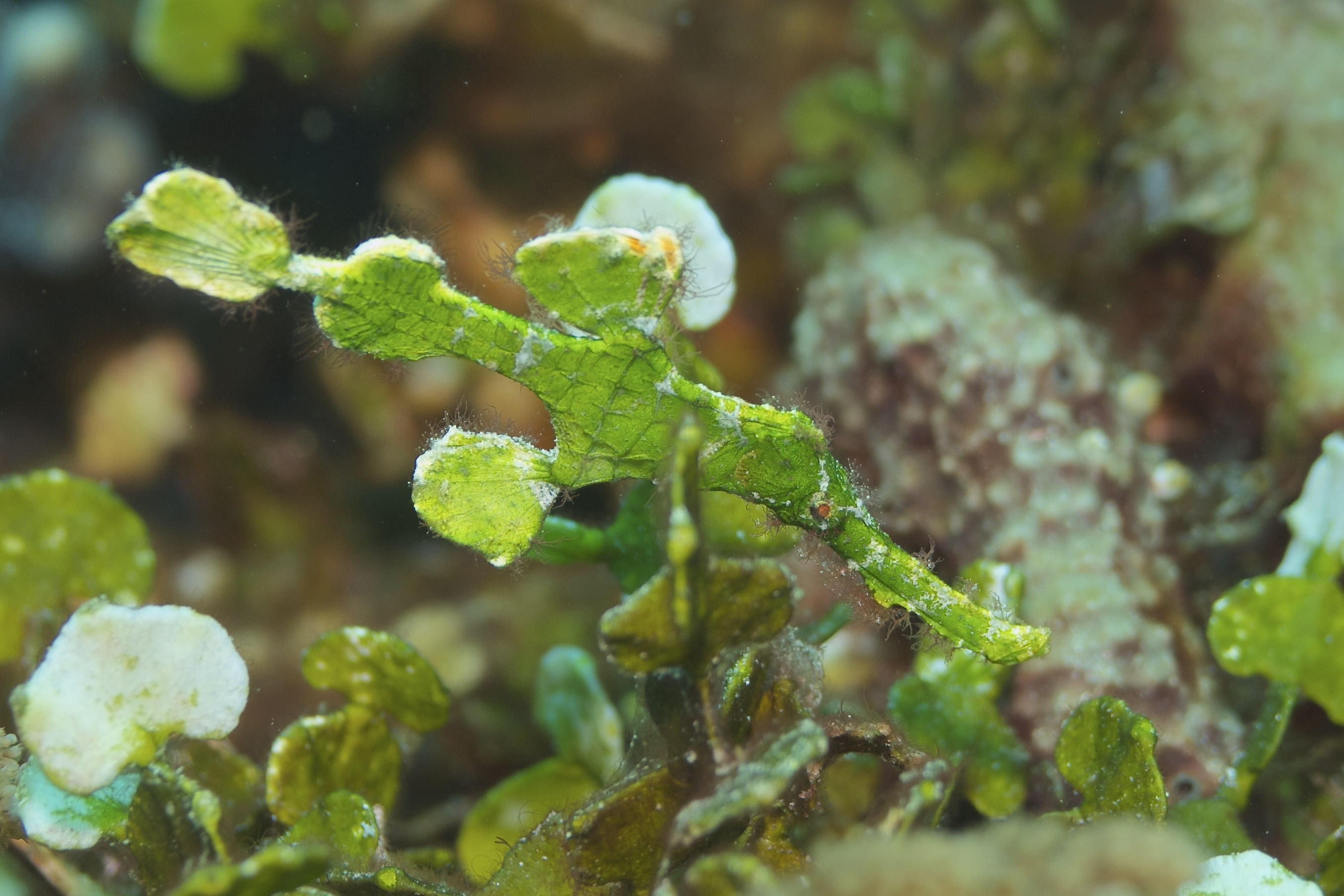 Solenostomus halimeda en Sorong, Papúa Occidental, Indonesia